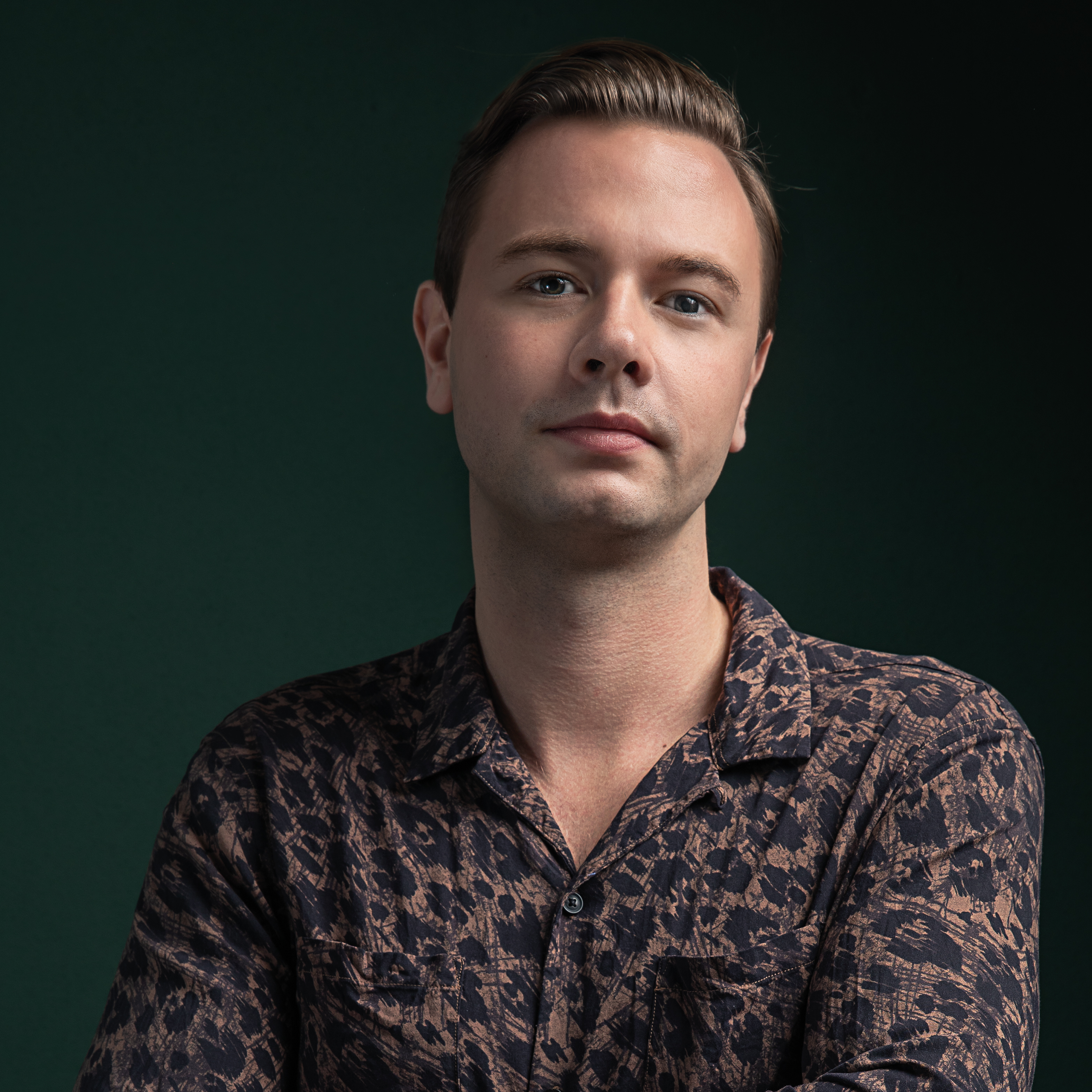 Sam Feldt